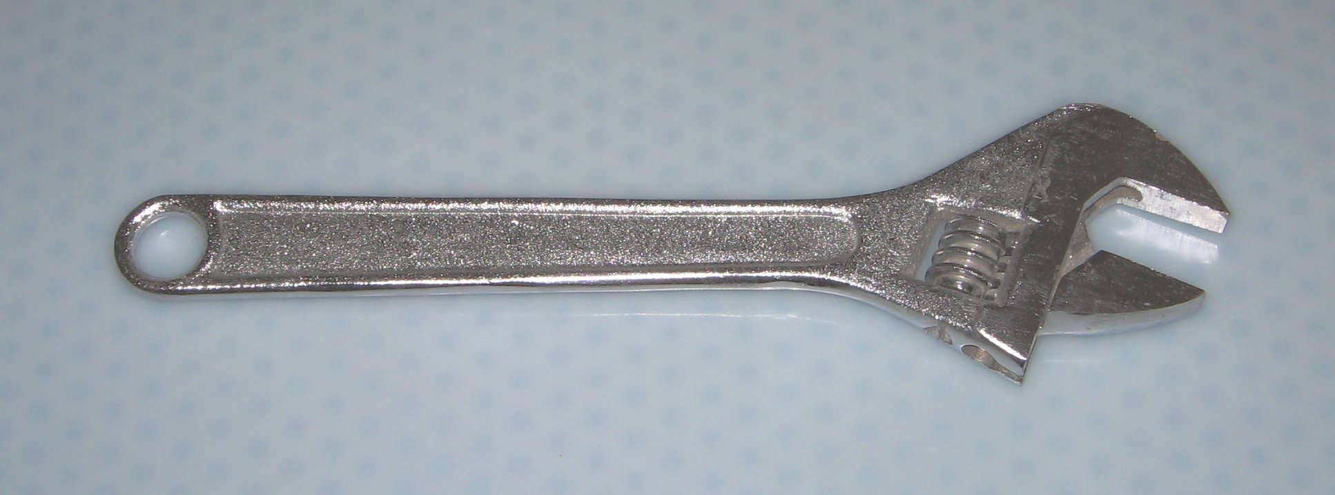 Universala rencxilo, kiu tauxgas por rencxi boltojn kaj sxrauxbingojn de cxiu amplekso en certa bendo. La foto estis farita de mi mem.